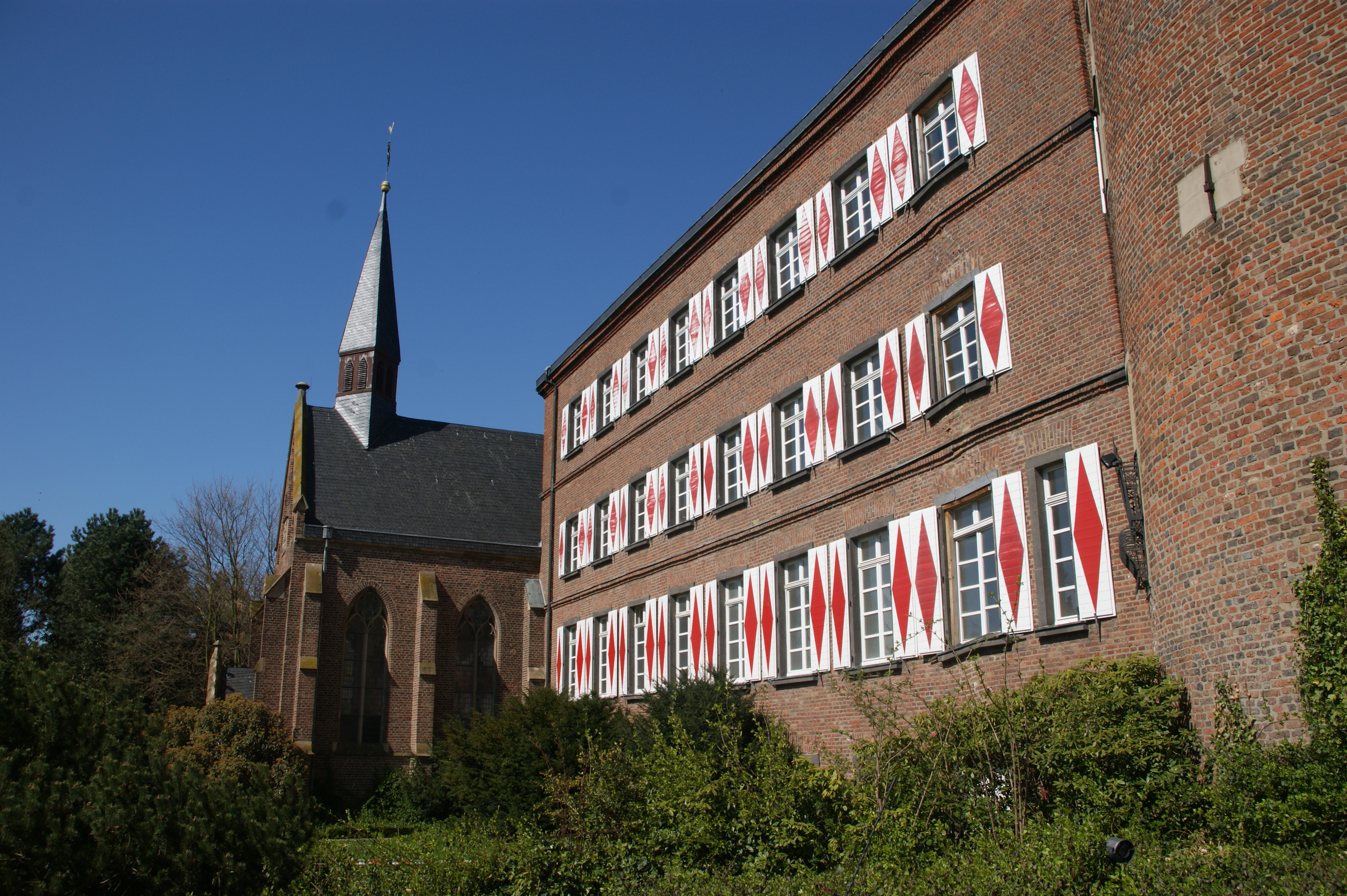 Rheinische Ritterakademie